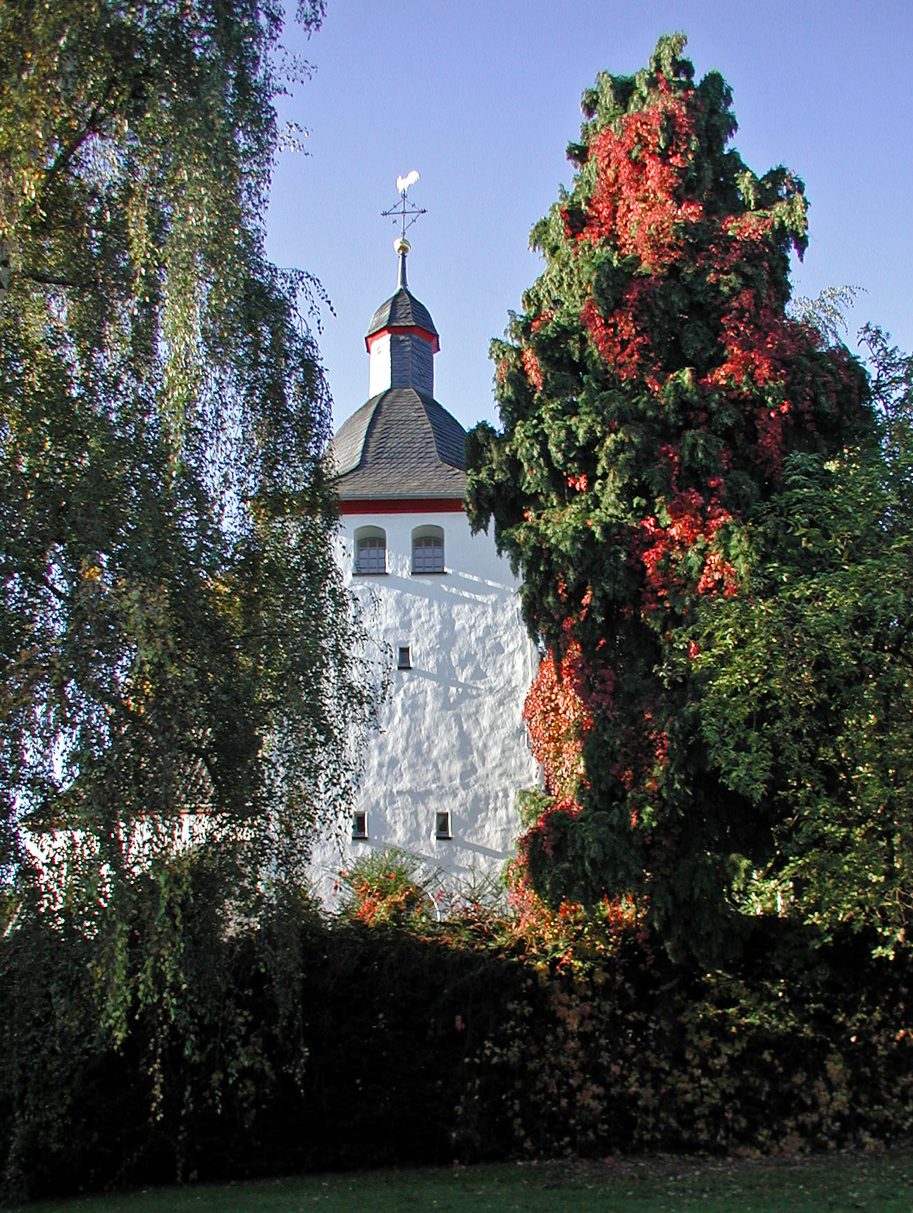 Alt St. Katharina - Alt-Huerth